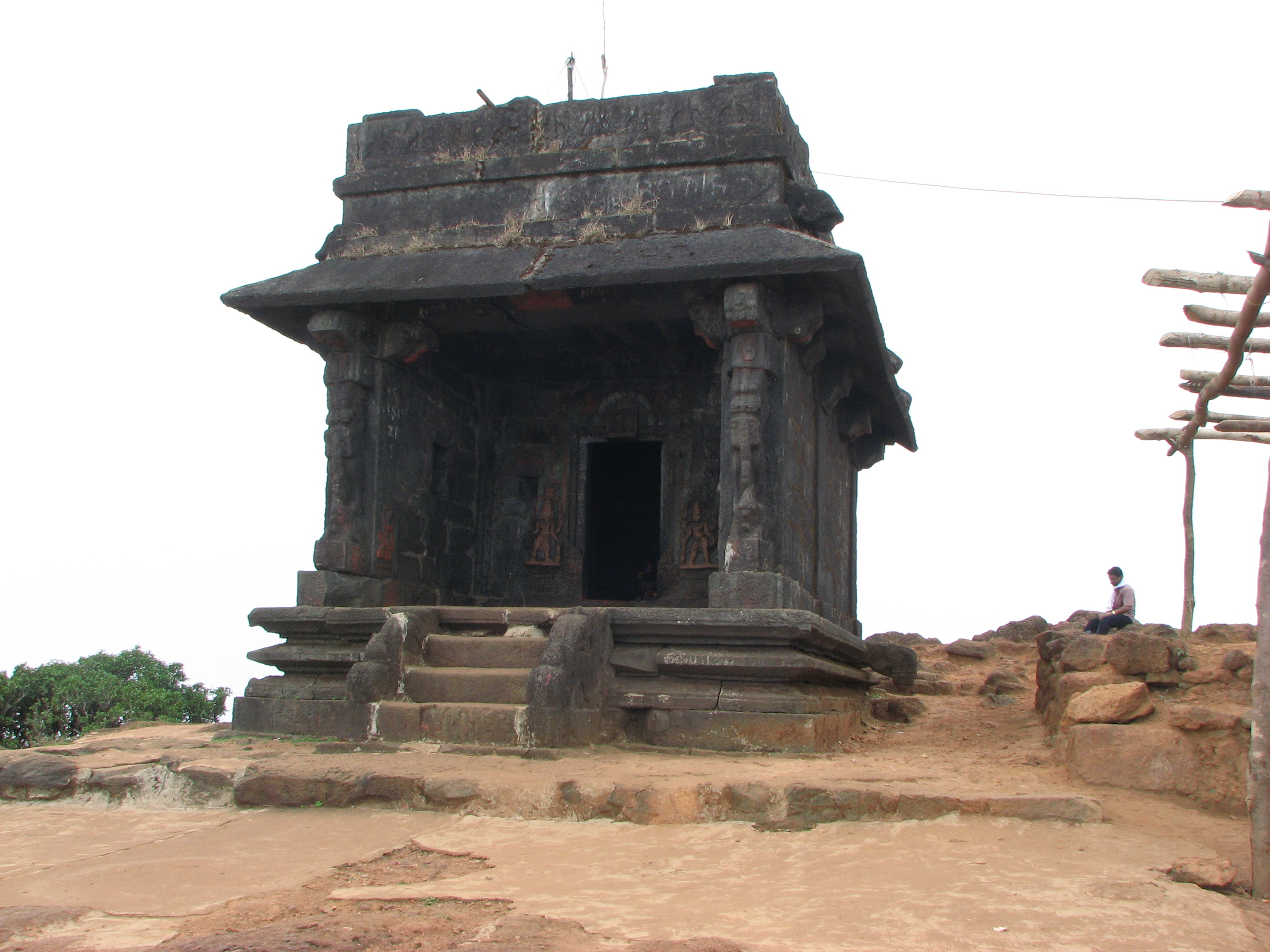 കുടജാദ്രി അംബാവനത്തിലെ ശങ്കരപീഠം.ദേവി ഇവിടെ വച്ച് ആദിശങ്കരനു ദർശനം നൽകി എന്നു വിശ്വാസം.